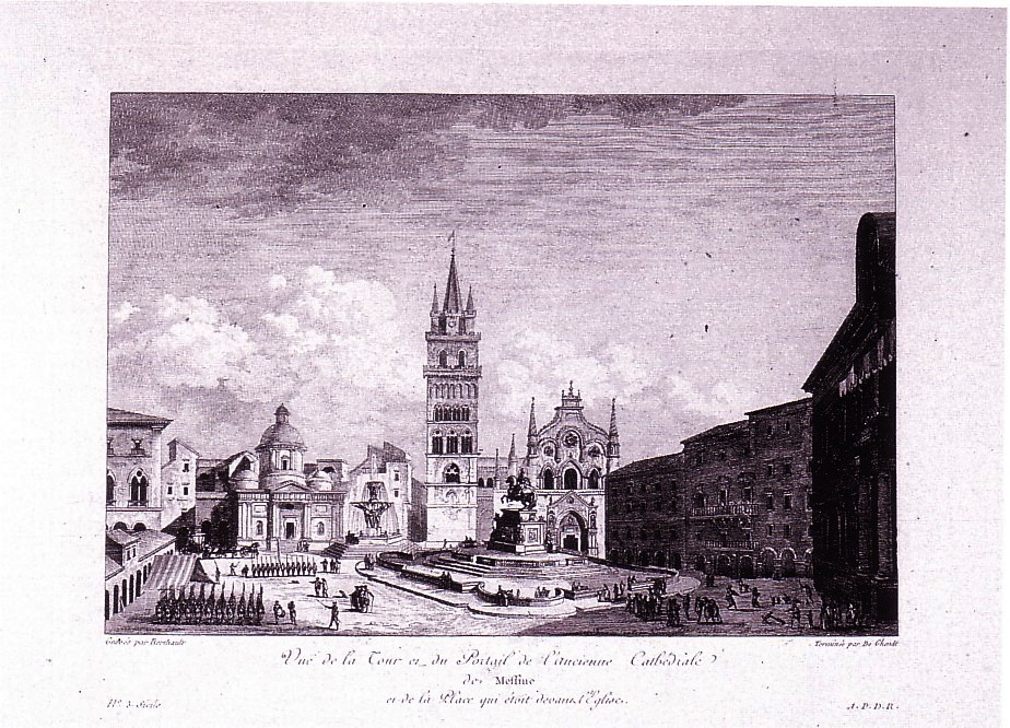 La piazza del Duomo di Messina come si presentava prima delle distruzioni del terremoto del 1783, in un'incisione della fine del XVIII secolo tratta da una incisione di Francesco Sicuro.